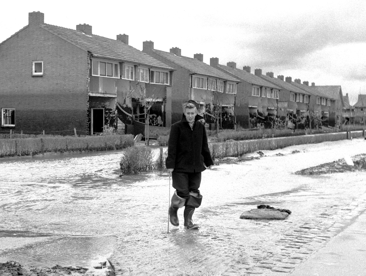 Henny Langeveld in 1953 in Zeeland na de watersnoodramp van 1953.